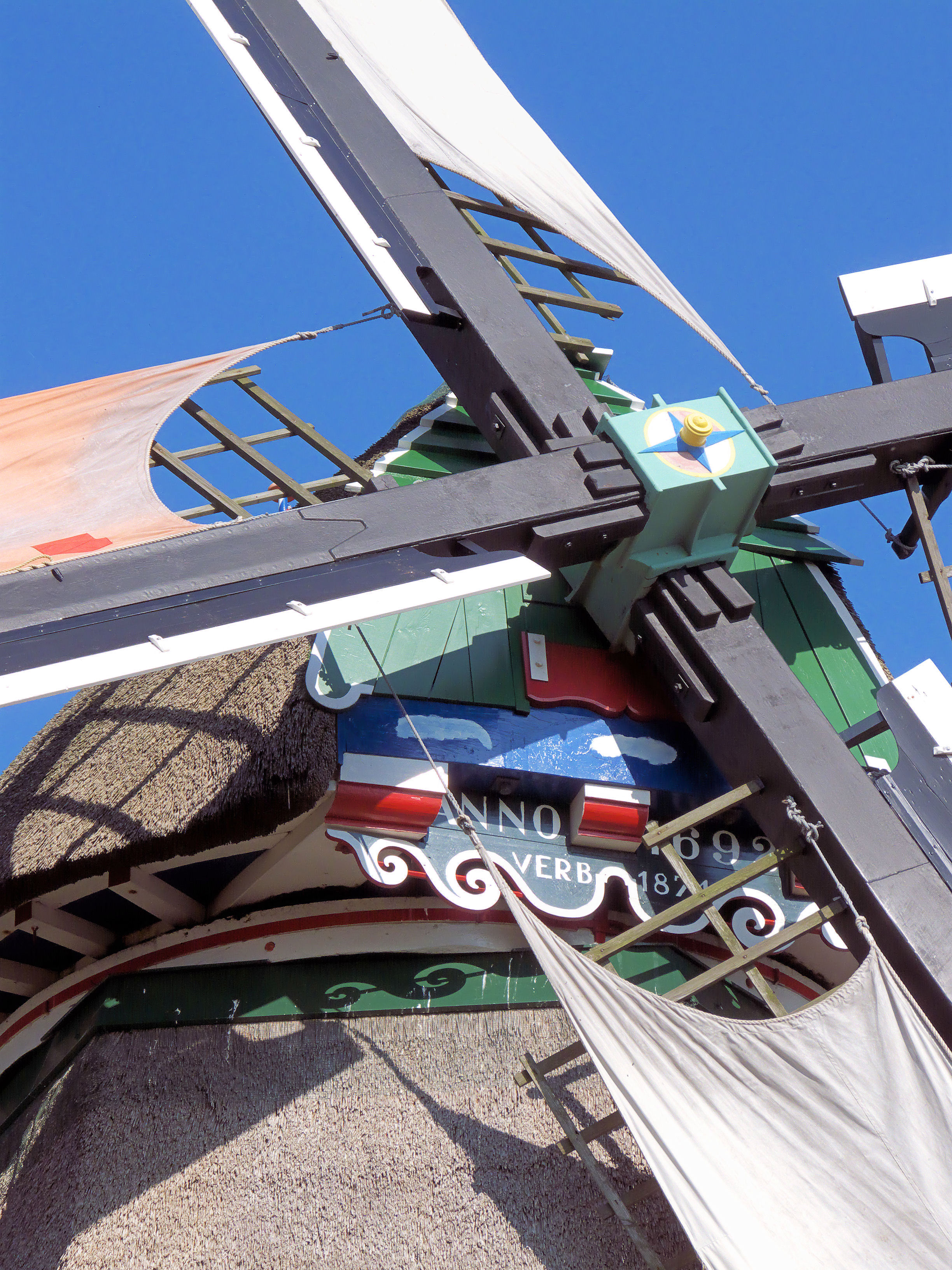 De Schoolmeester askop en baard. Buitenste roe is een potroe.